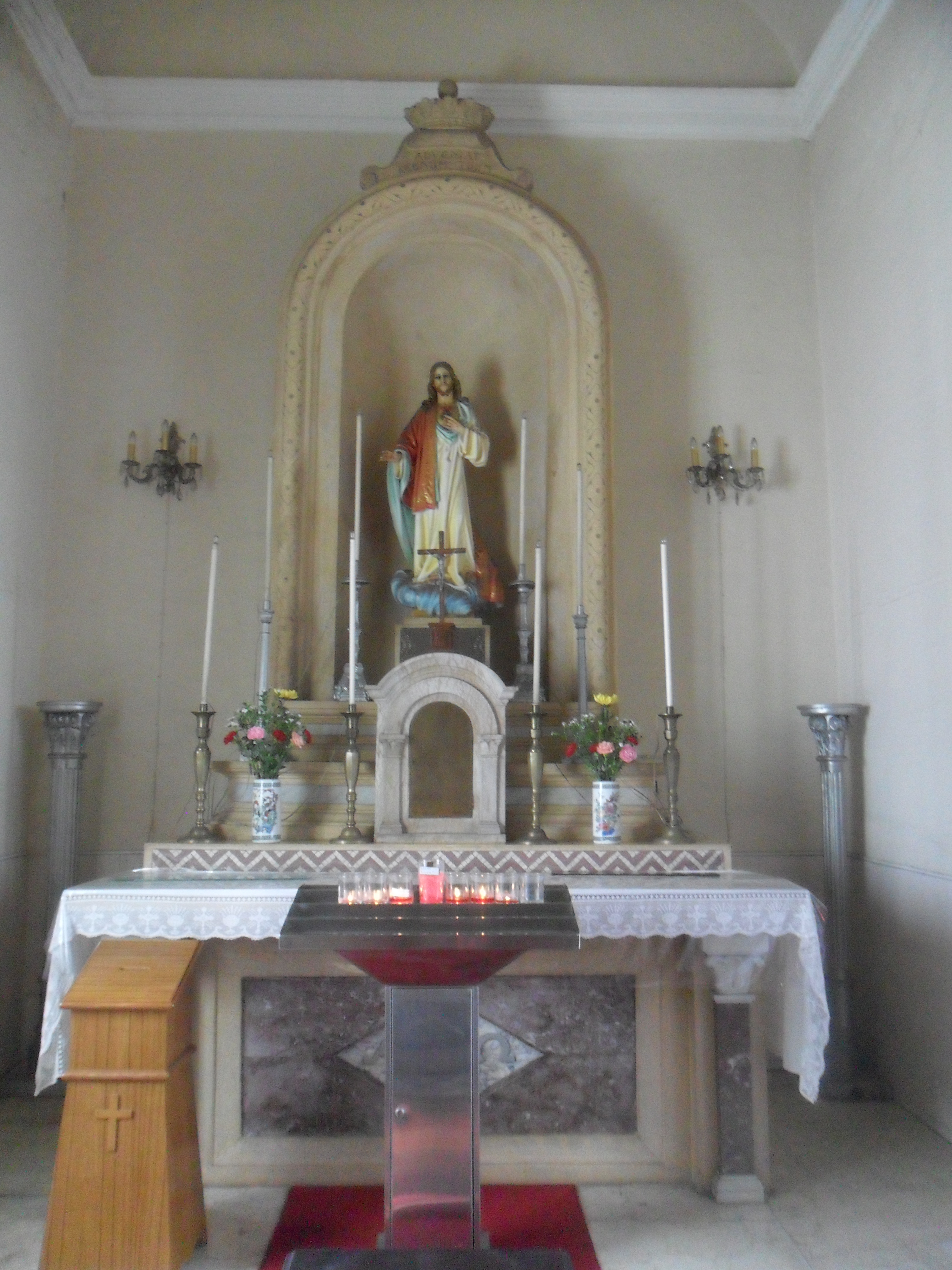 中文(香港): 聖安多尼堂, 澳門, 中國